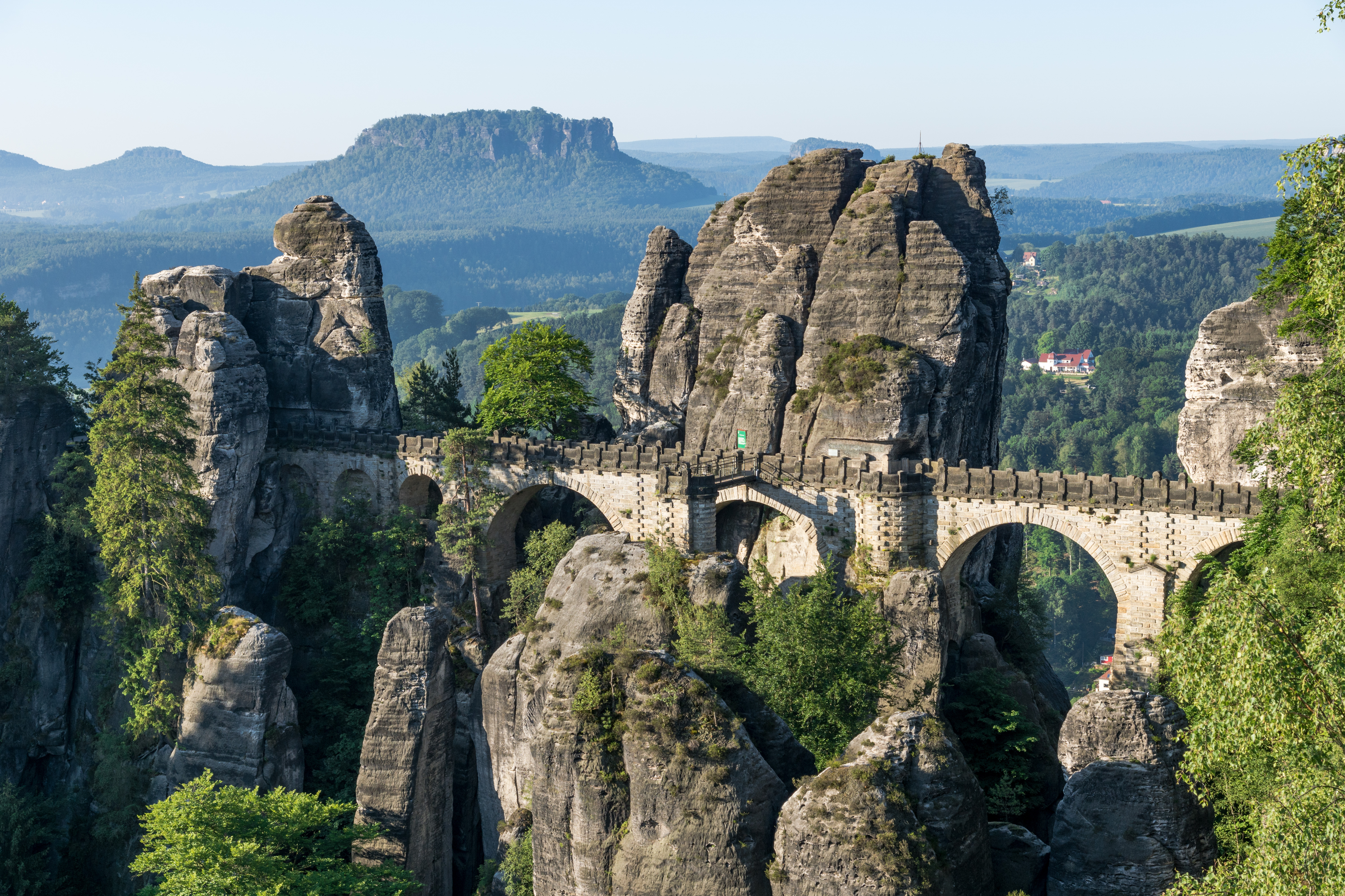 Blick vom Ferdinandstein auf die Bastei und Basteibrücke in der Sächsischen Schweiz.